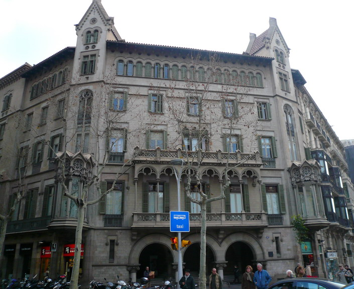 Casa Marfà, al passeig de Gràcia de Barcelona